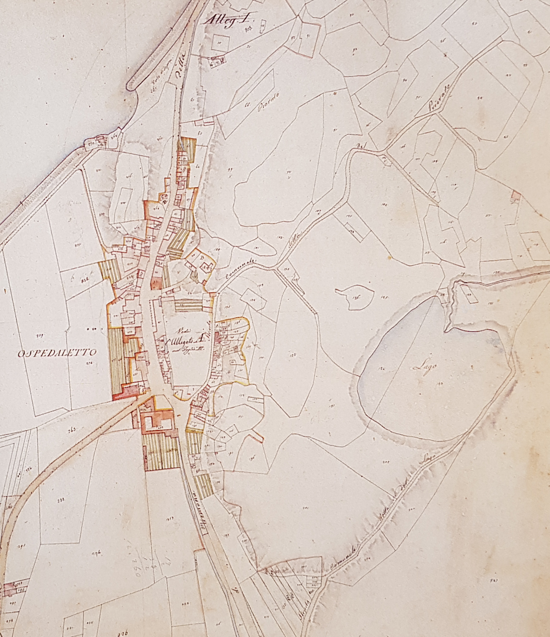 Mappa di Ospedaletto di Gemona del Friuli - Campagna di rilievo topografico 1813